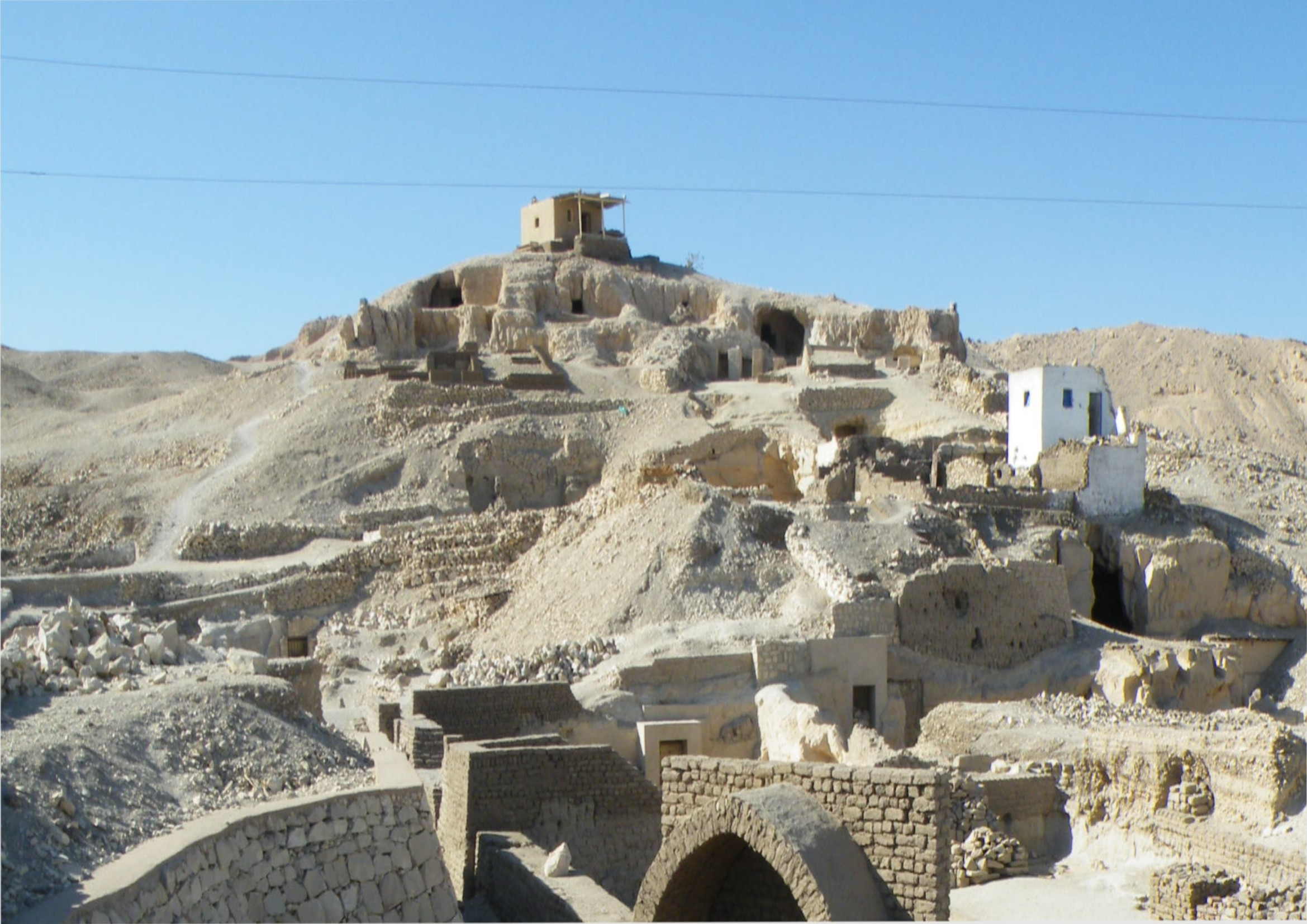 Az El-Khoha domb a TT184 környéke (Luxor, Thébai nekropolisz, Egyiptom)